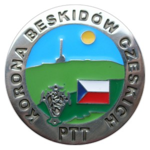 OKT PTT WKB CZ